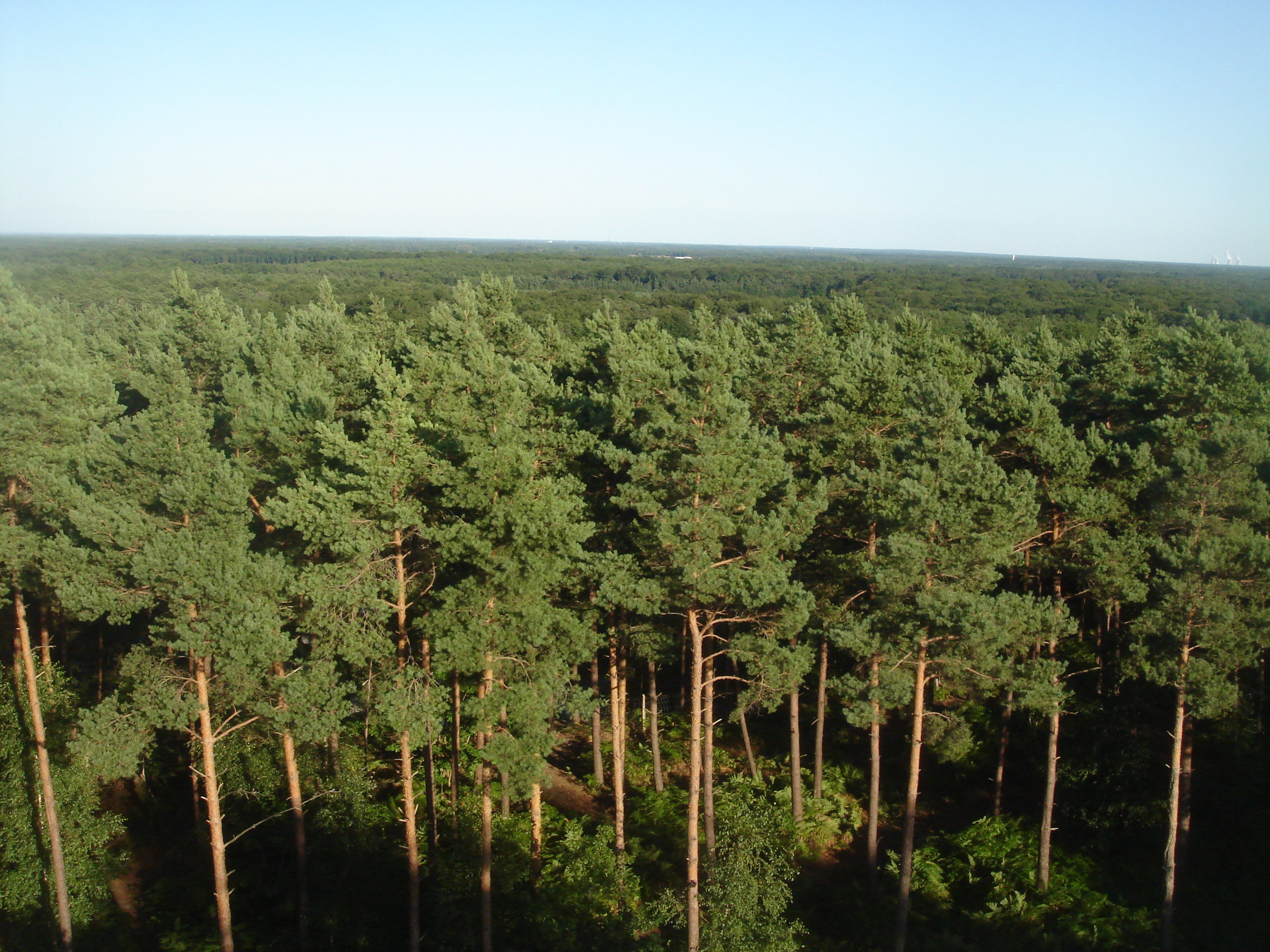 La forêt d'Orléans depuis l'observatoire des Caillettes, Nibelle, Loiret, France